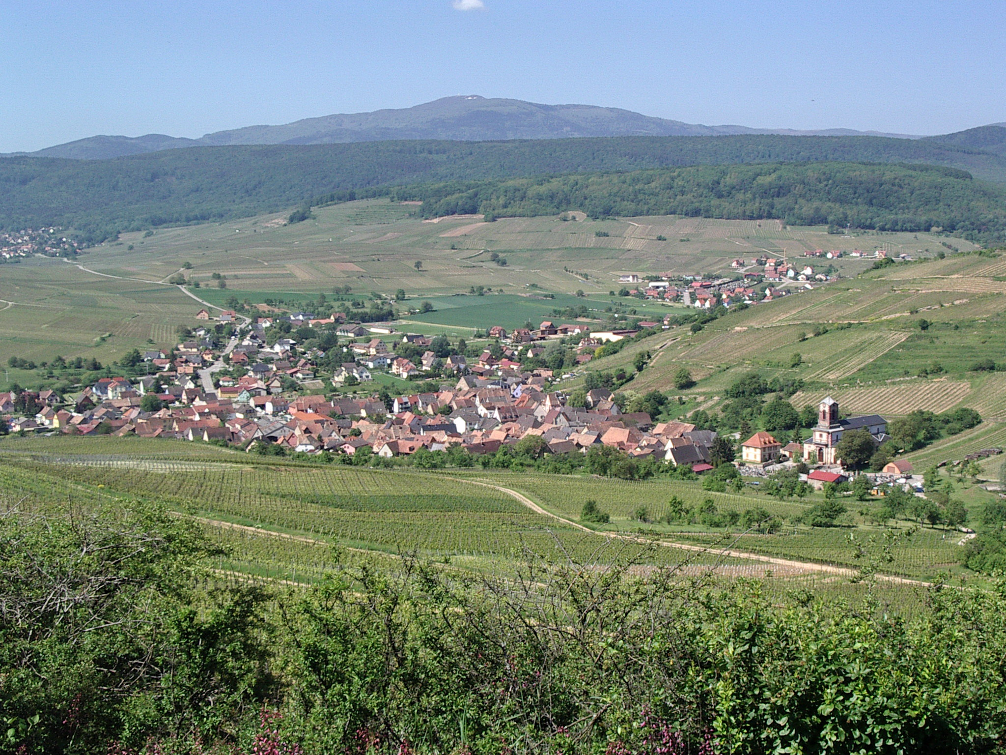 Vue de Westhalten, Haut-Rhin, Alsace, France